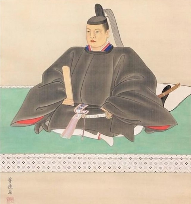 小笠原忠幹の肖像。